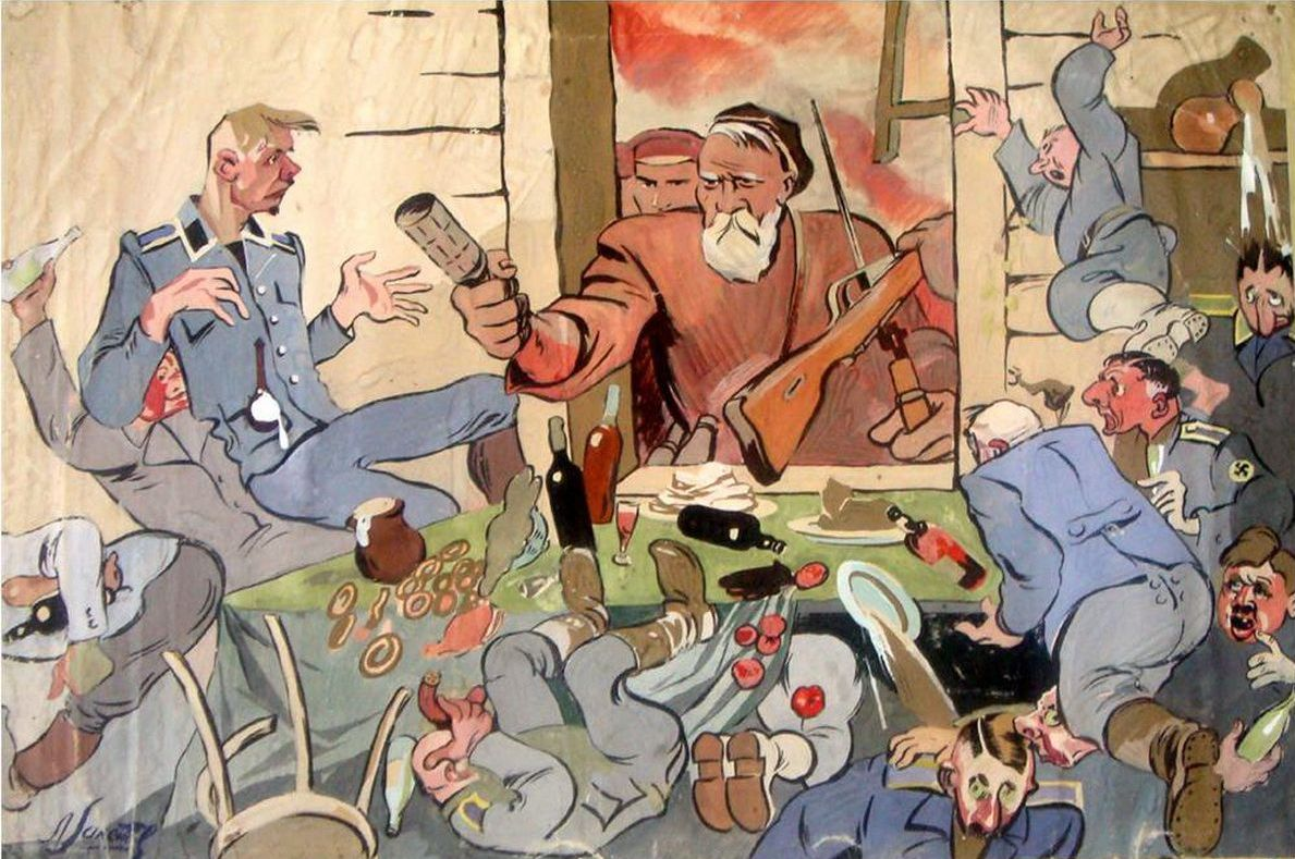 плакаты Леонида Залетова (1910-1943)